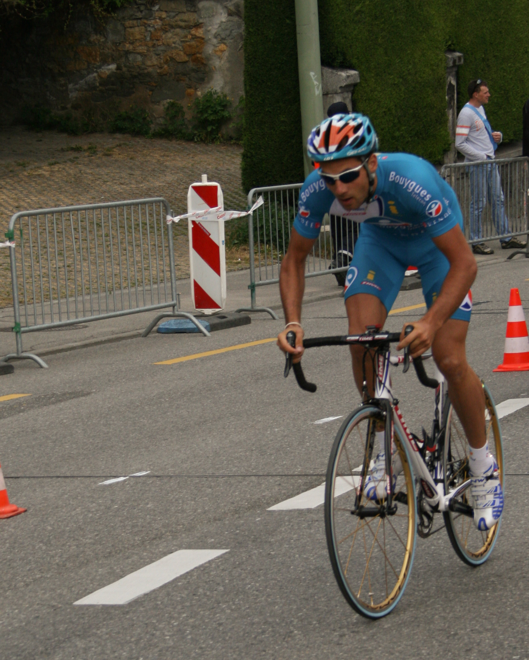 Olivier Bonnaire prologue du Tour de Romandie 2007